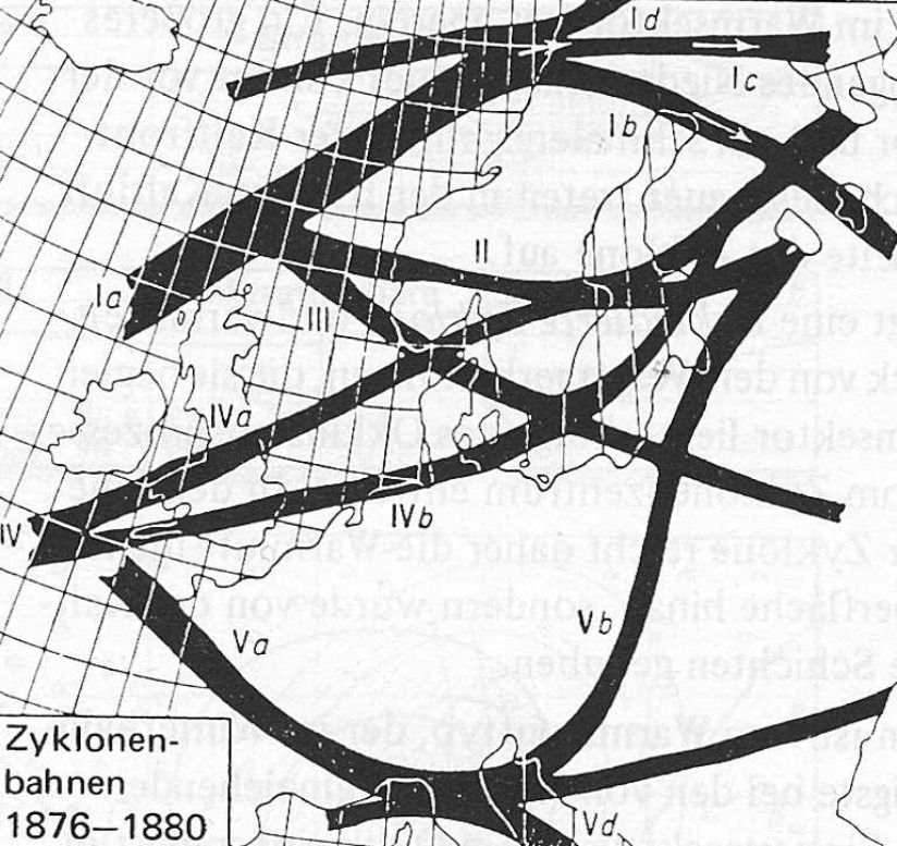 Zugstraßen von Tiefdruckgebieten